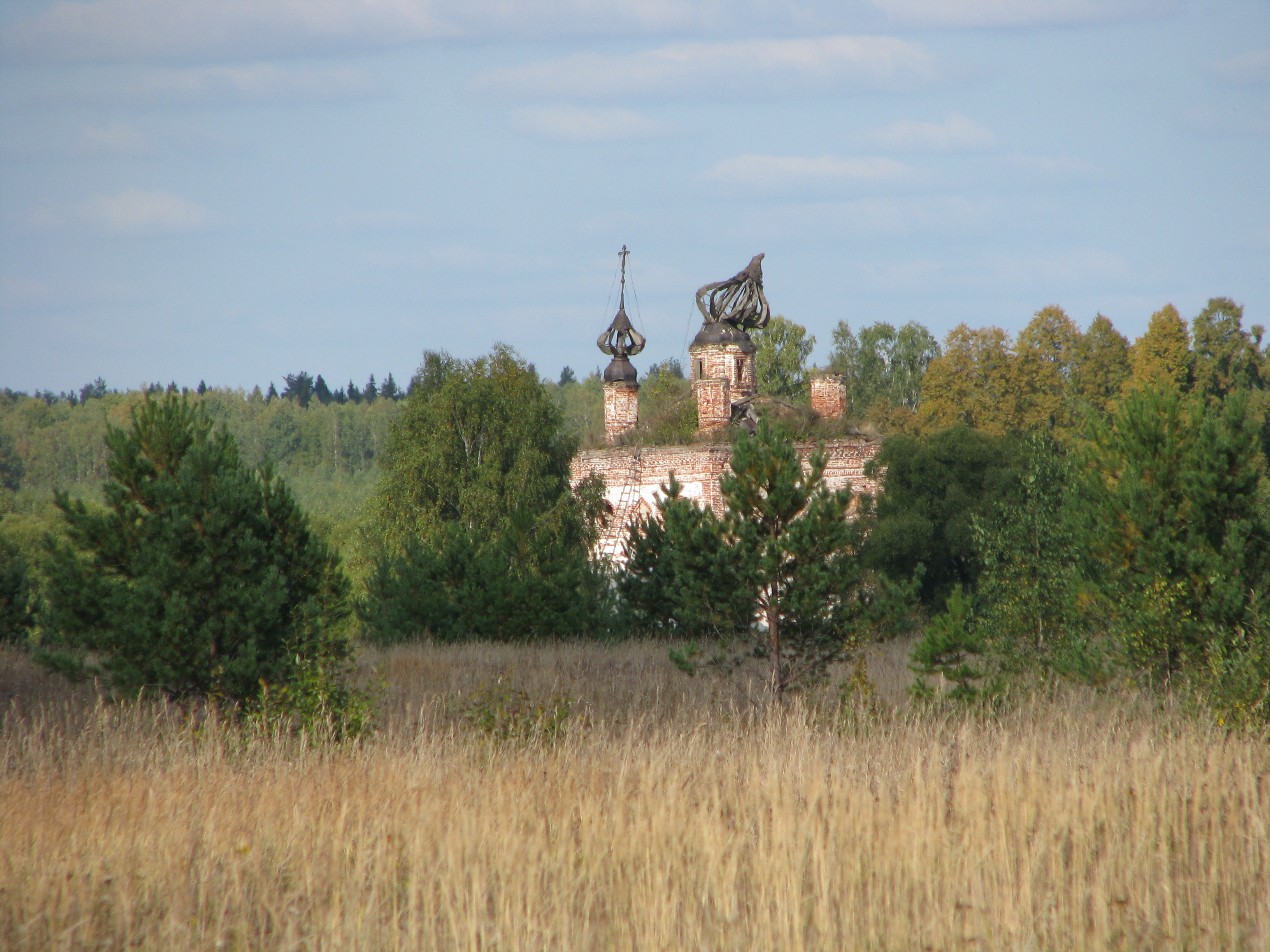 Благовещенская церковь: Ряполово, Южский район, Ивановская область